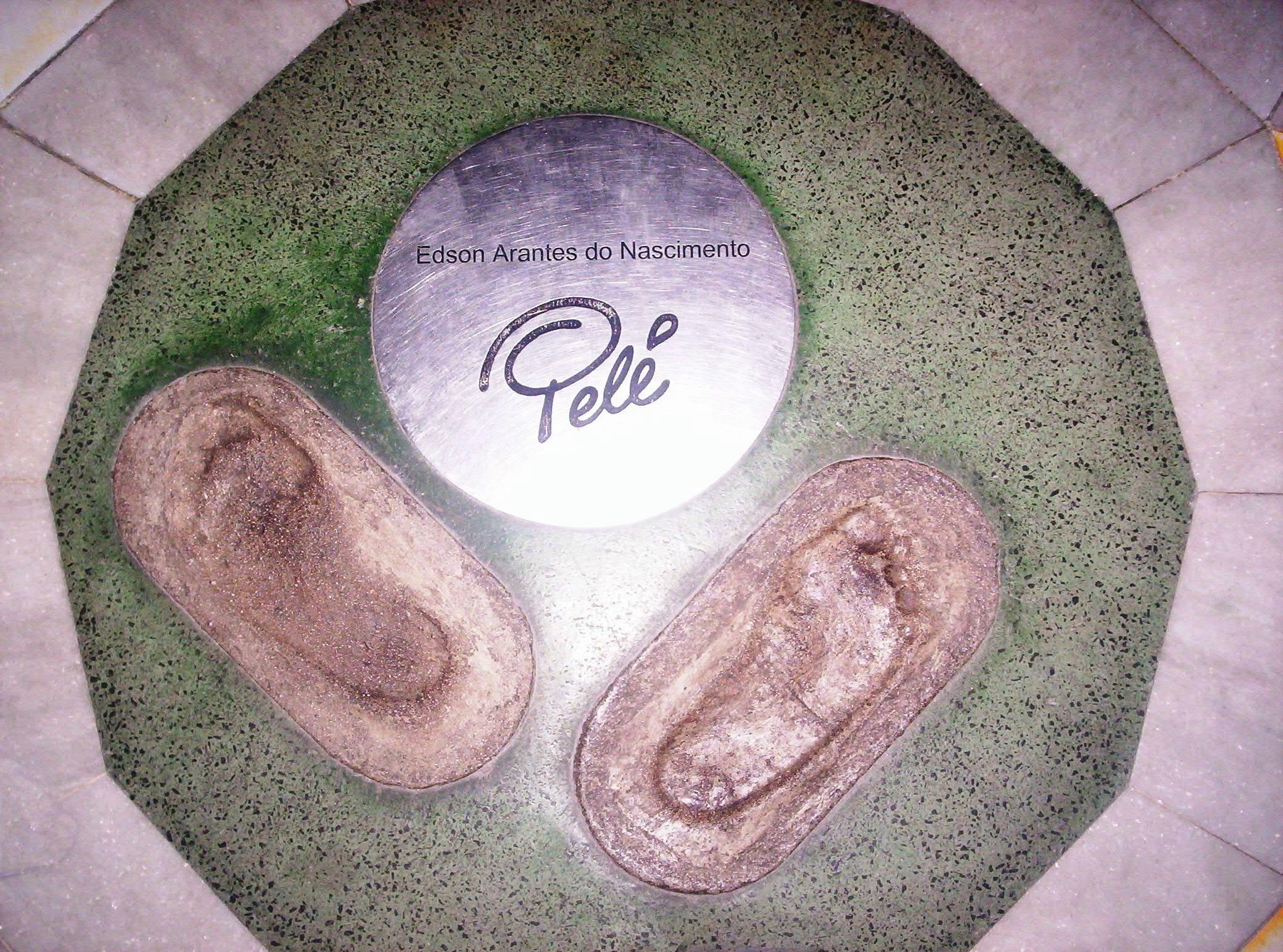 Las huellas de los pies del jugador de fútbol brasilero Pelé, dentro del recinto del estadio Maracaná, en Río de Janeiro, Brasil.